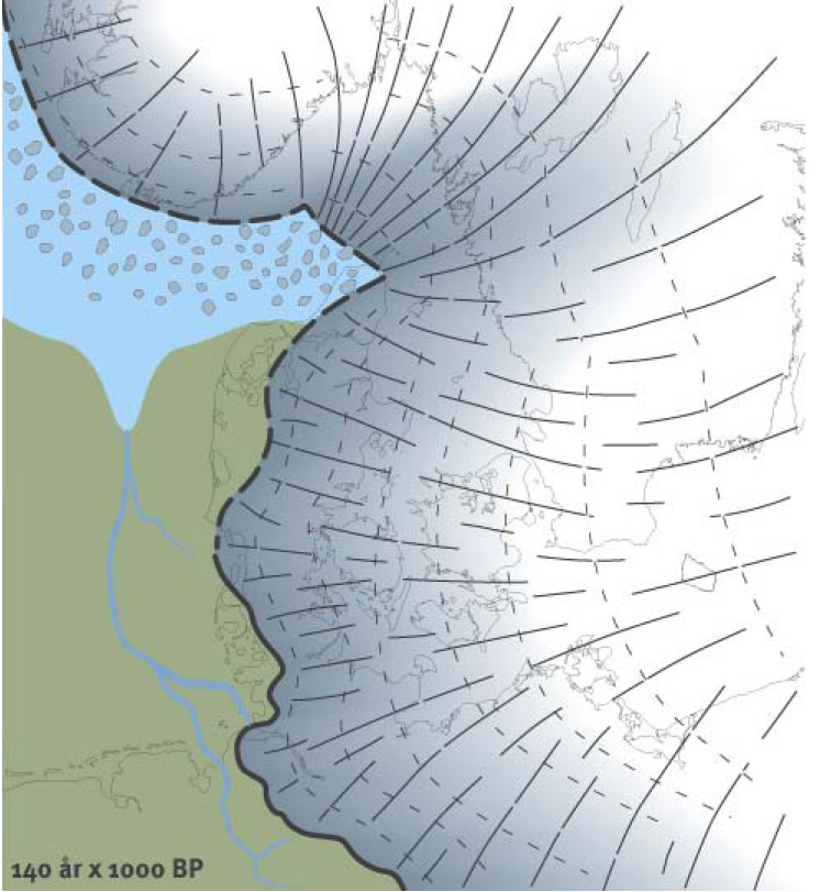 Danmarks udseende for 140.000 år siden (Saale istid, Warthe fremstød)